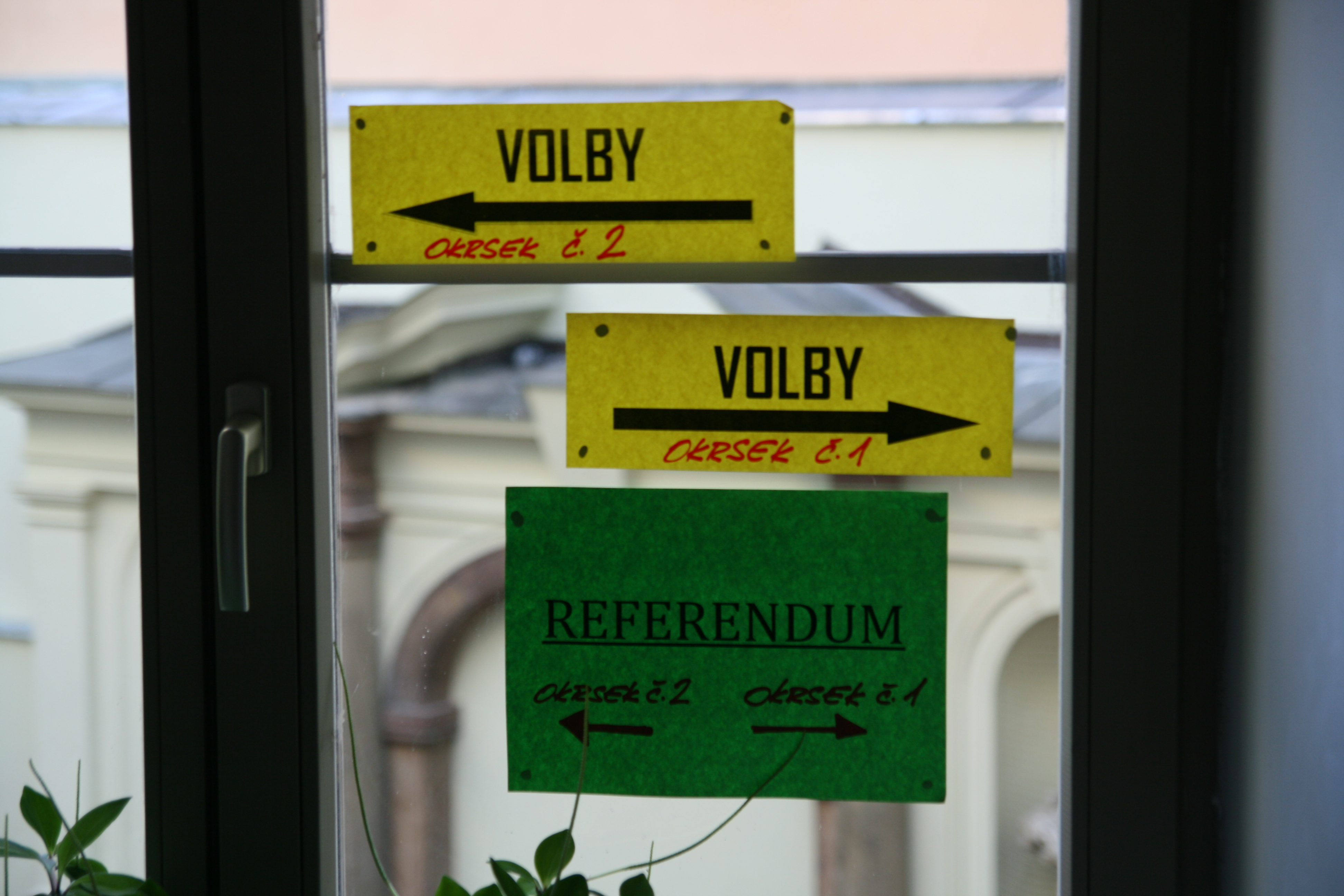 Volby do zastupitelstva Jihomoravského kraje 7.-8. října 2016 spojené v Brně s referendem o hlavním vlakovém nádraží.